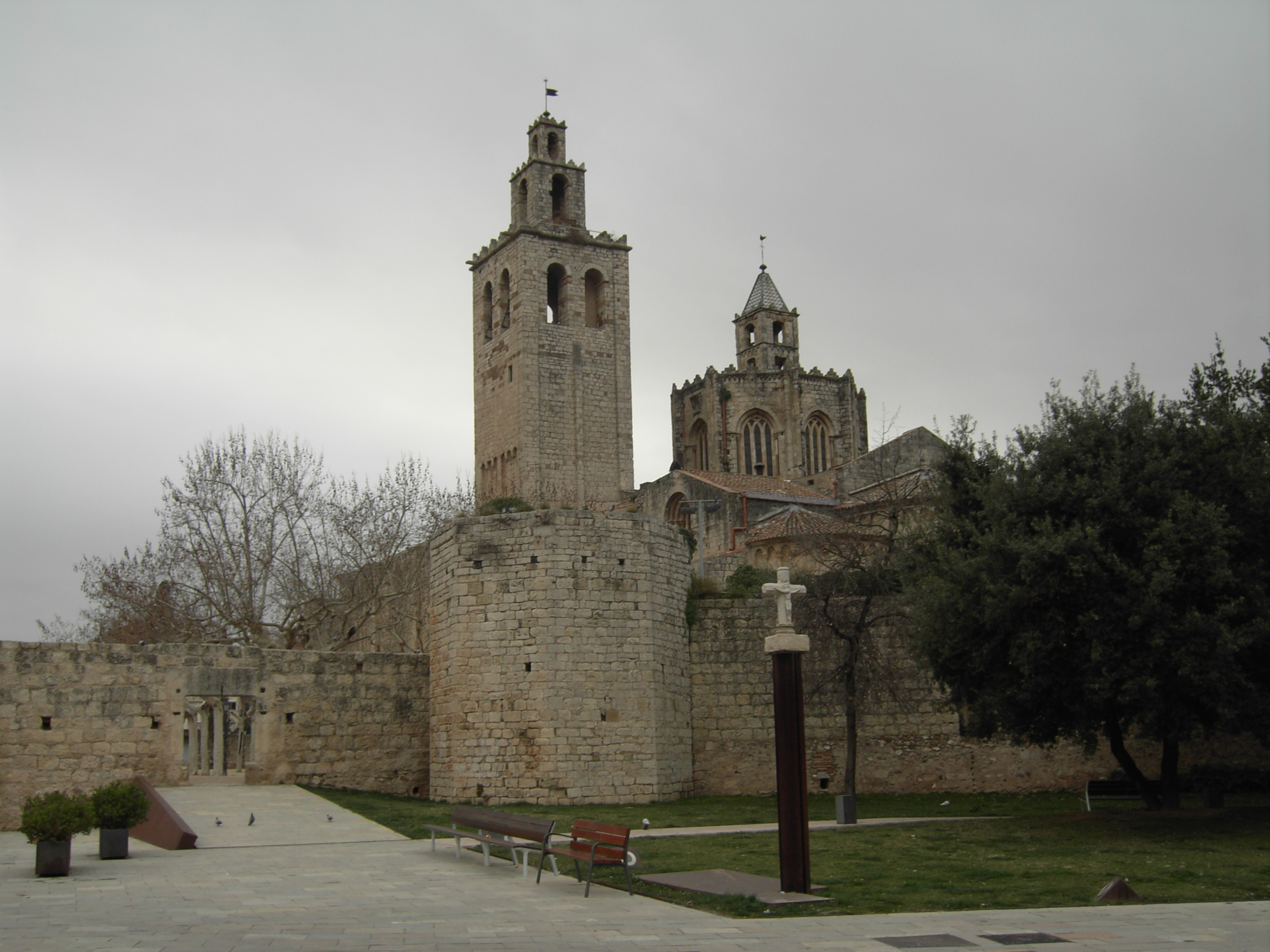 San Cugat del Vallès monastery, Catalonia